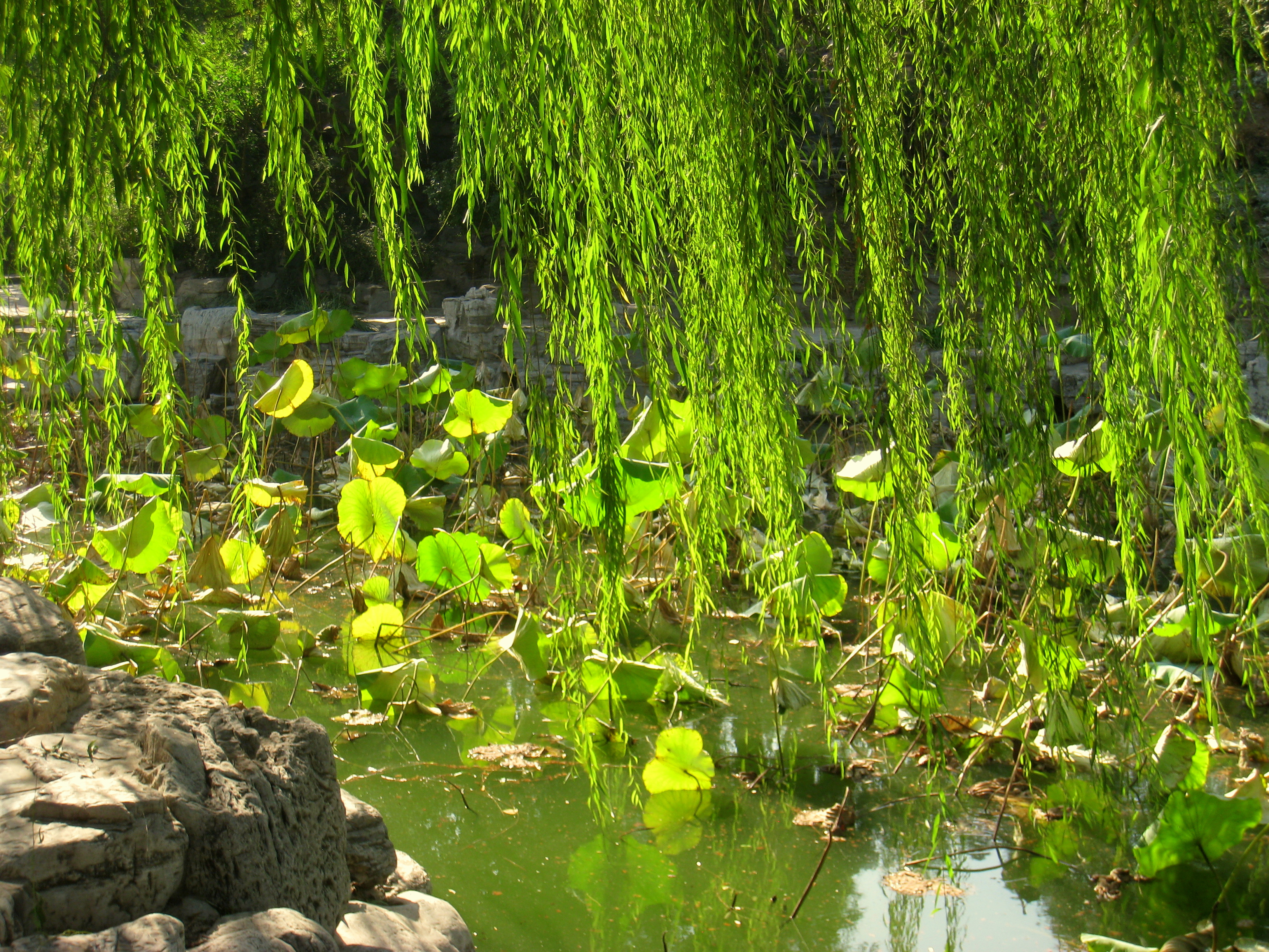 Beijing Zoo (北京动物园), Beijing, China.